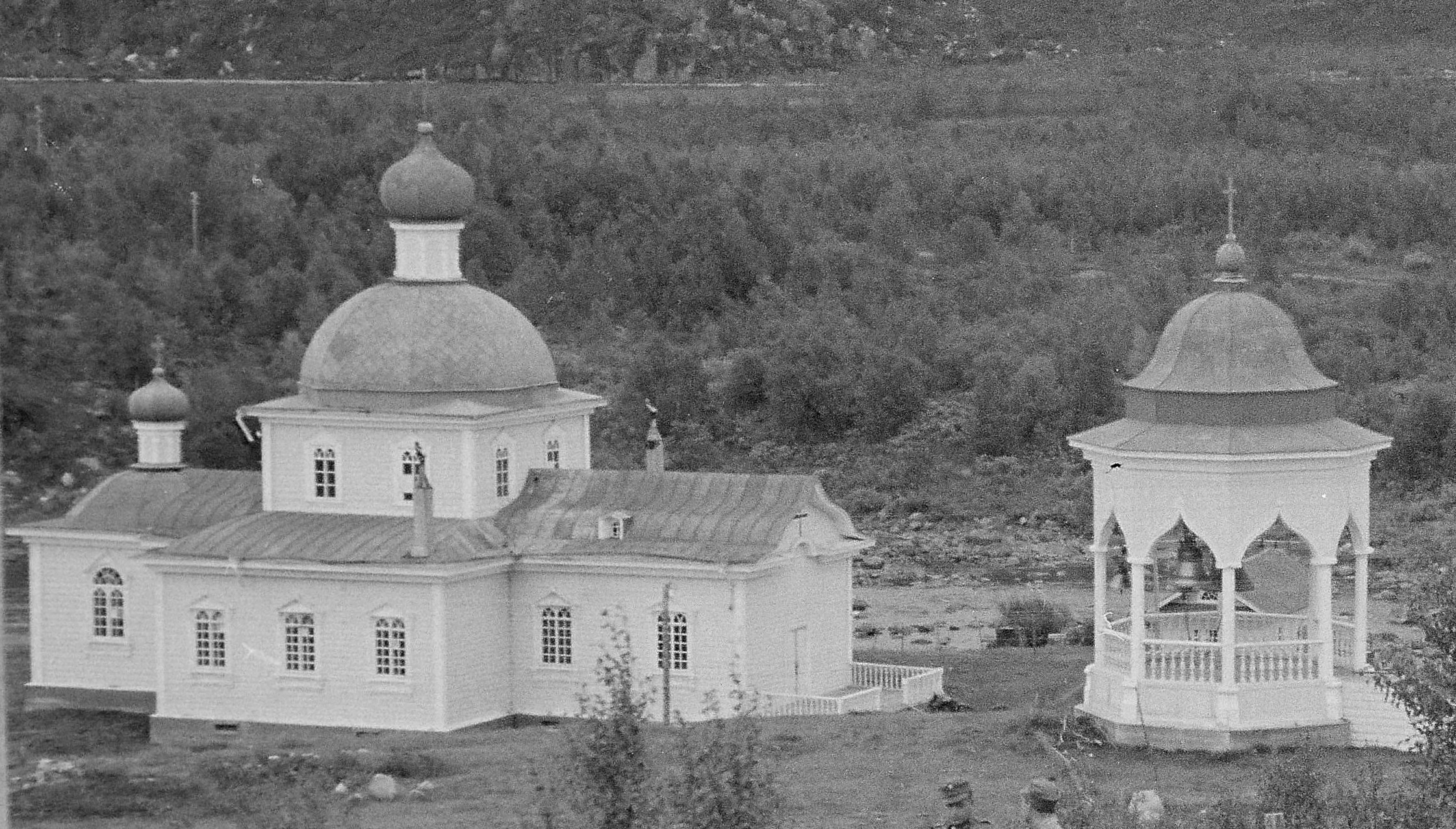 Христорождественская церковь